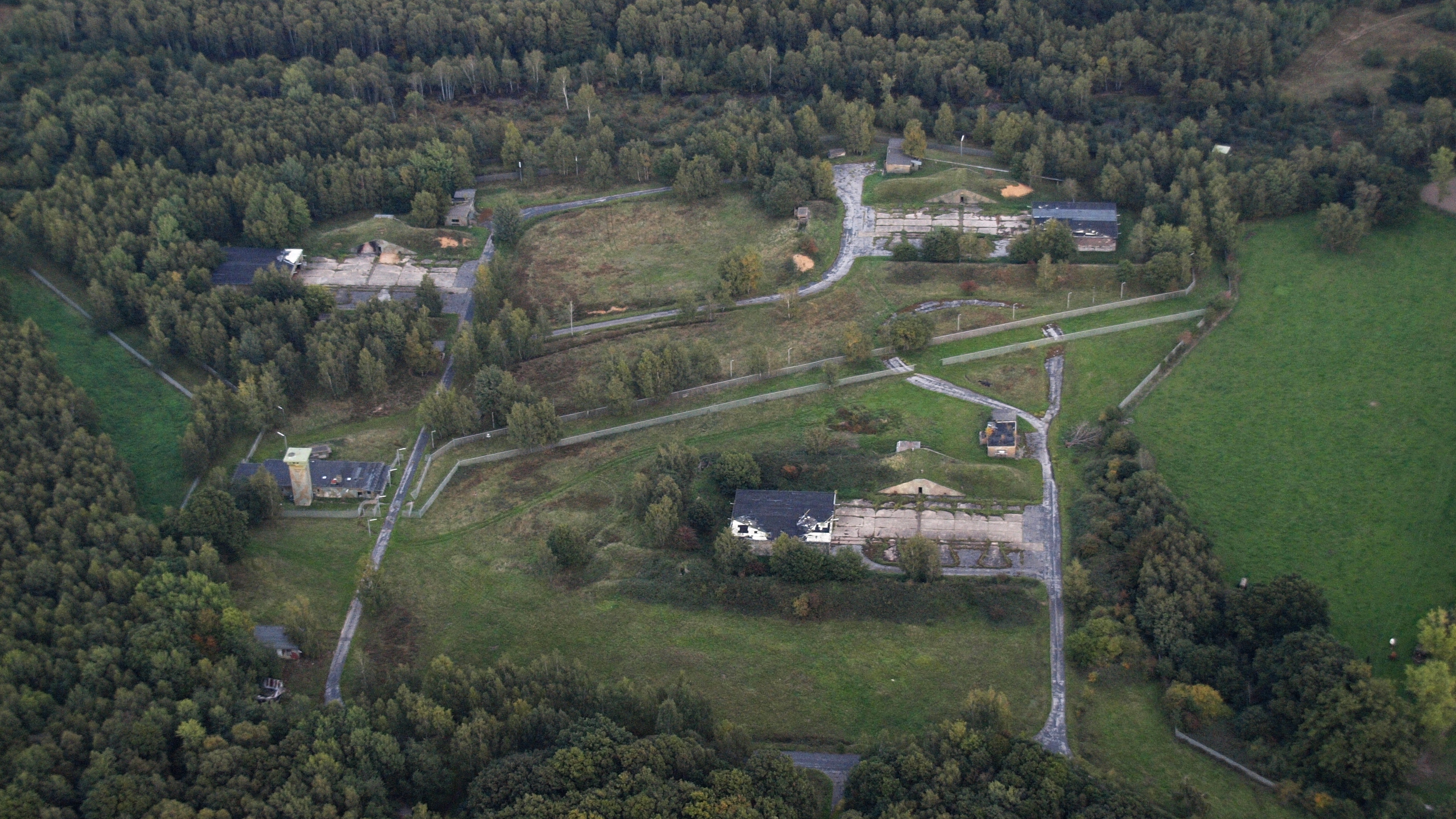 Raketenstation Thum, Luftaufnahme (2015)